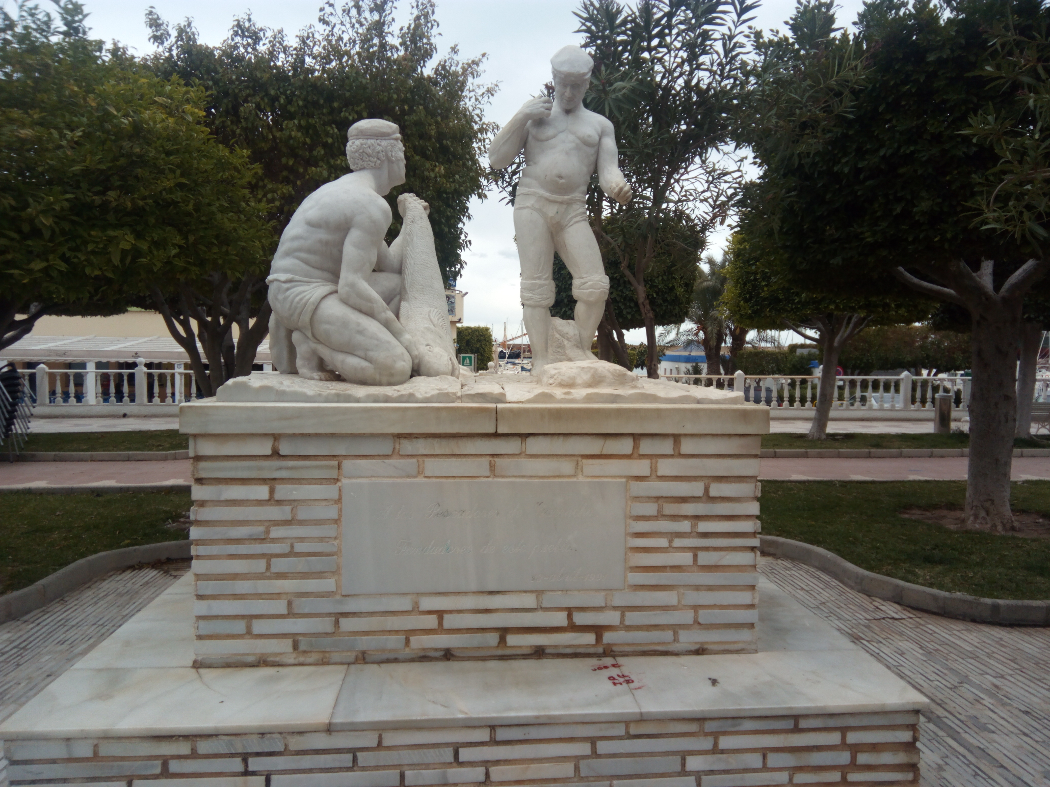 Monumento al Pescador en Garrucha